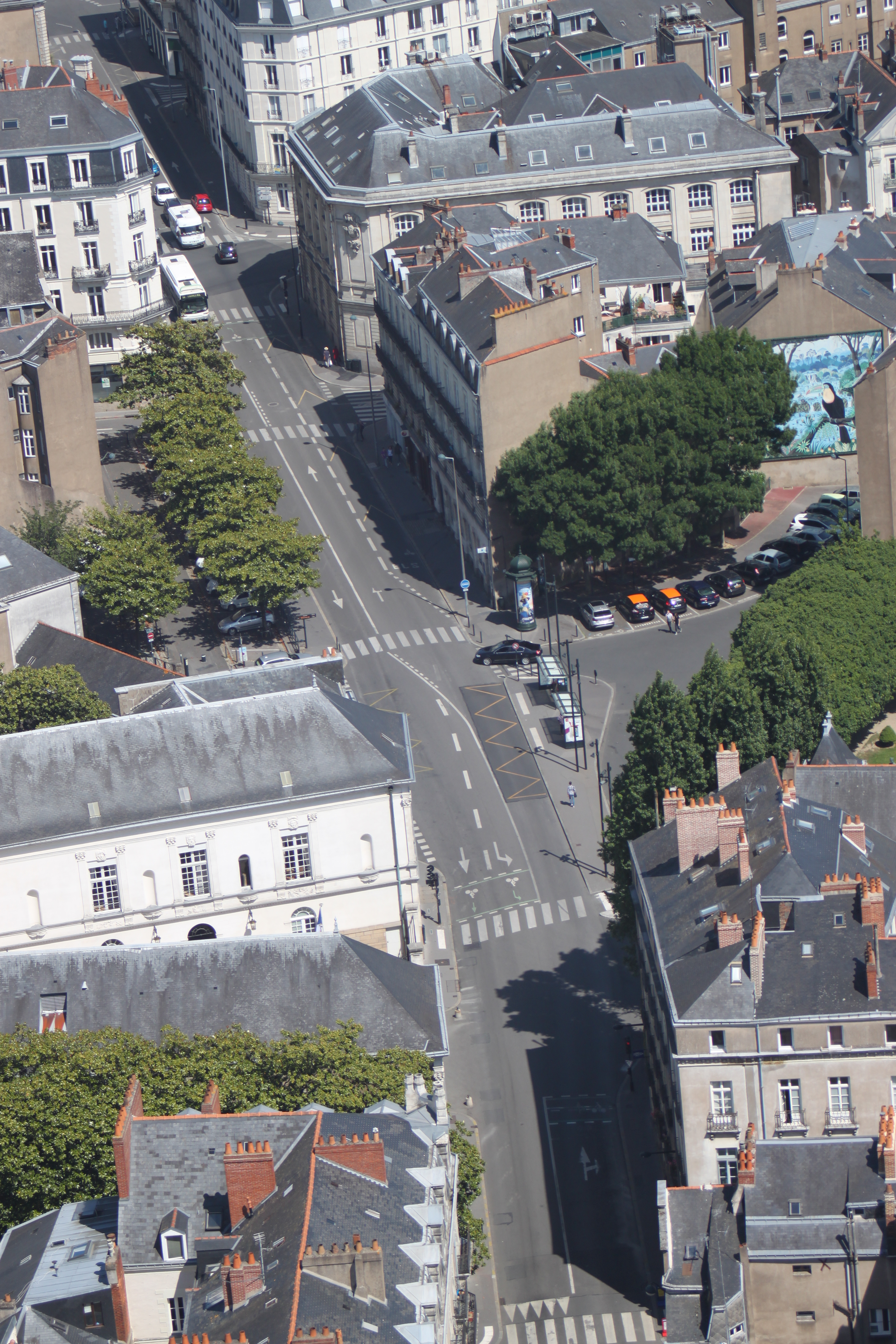 Rue de l'Hôtel-de-Ville (en bas), place de l'Hôtel-de-Ville (au centre) et Rue Leclerc-de-Hauteclocque (en haut), Fr-44-Nantes.